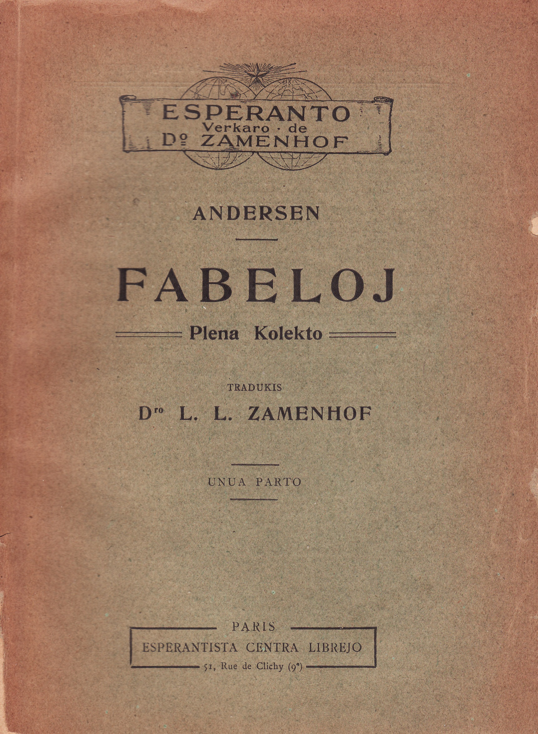 Fabeloj. Plena Kolekto